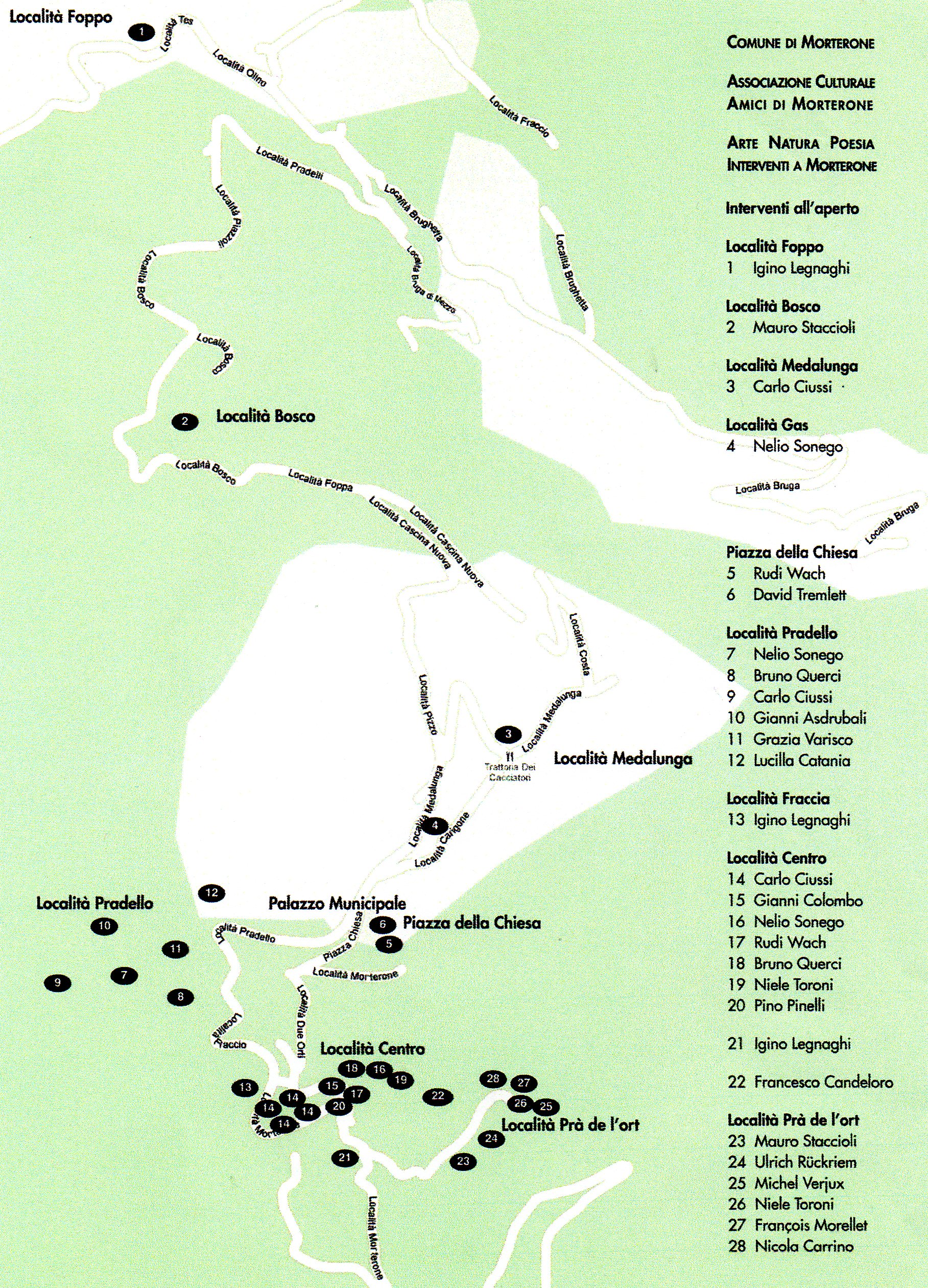 Mappa dell'itinerario del Museo all'aperto di Morterone, presente nel libro: Morterone, una soglia poetica